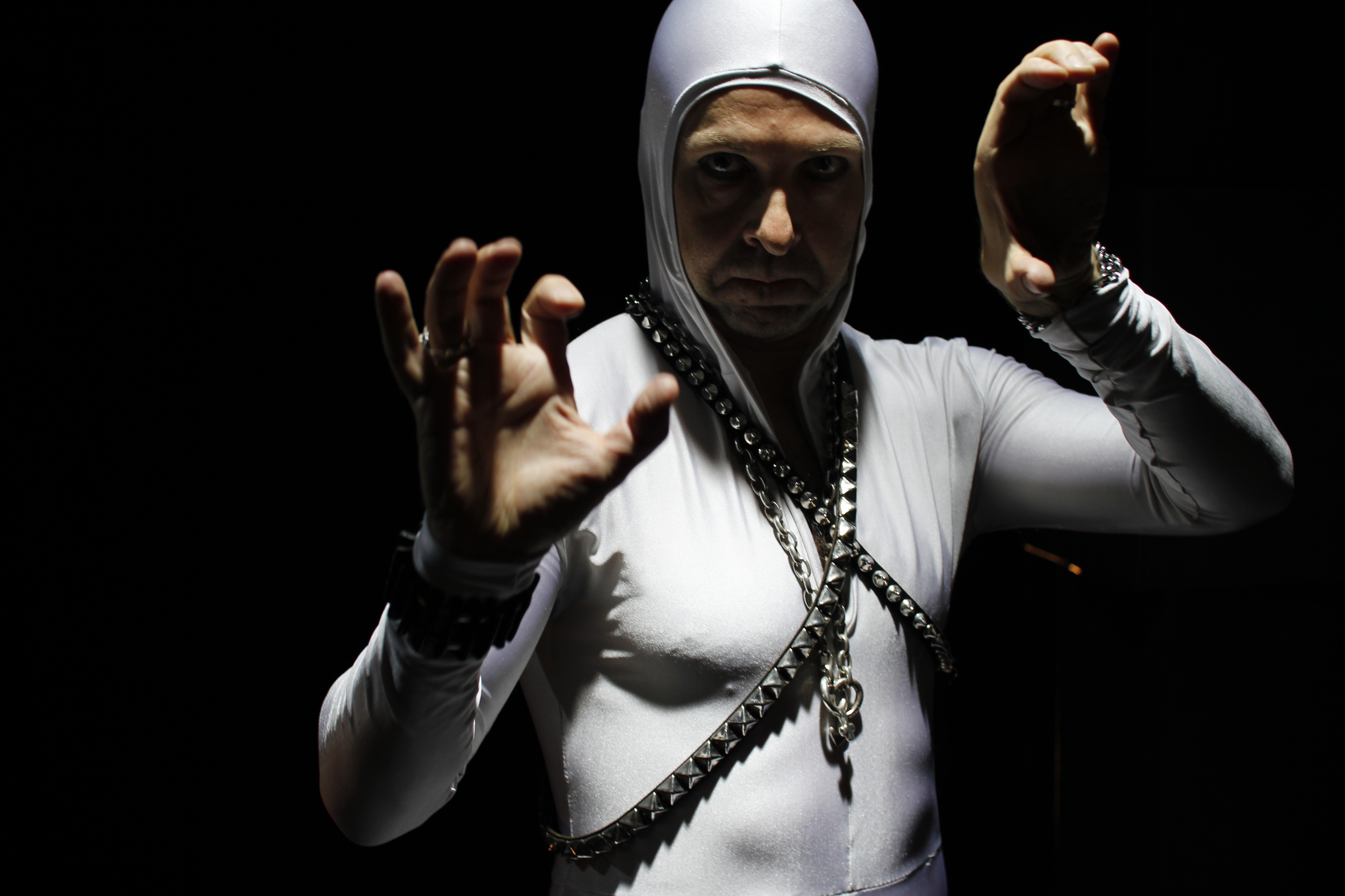 Kuva on otettu Kuolio-musikaali esityksessä.